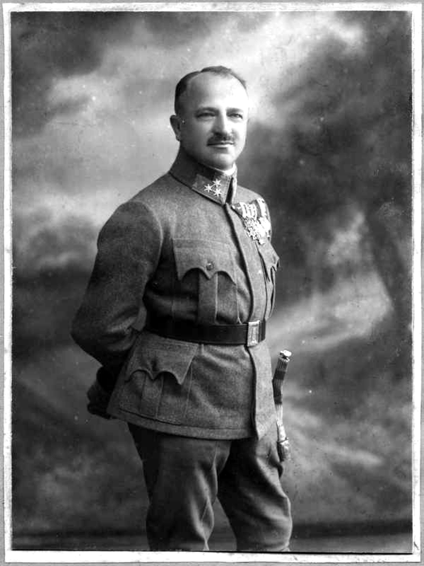 Szentkereszthegyi Kratochvil Károly (a saját maga által alkalmazott írásmód szerint, más források említik Kratochwillként, Kratochvillként is) (Brünn, 1869. december 13. – 1946. szeptember 19.) magyar katona, a Székely Hadosztály parancsnoka.